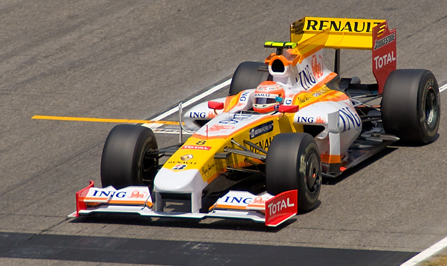 Nikon D90 + Sigma 18-200 DC OS HSM 1/2000s - F/9 - 200mm - ISO640